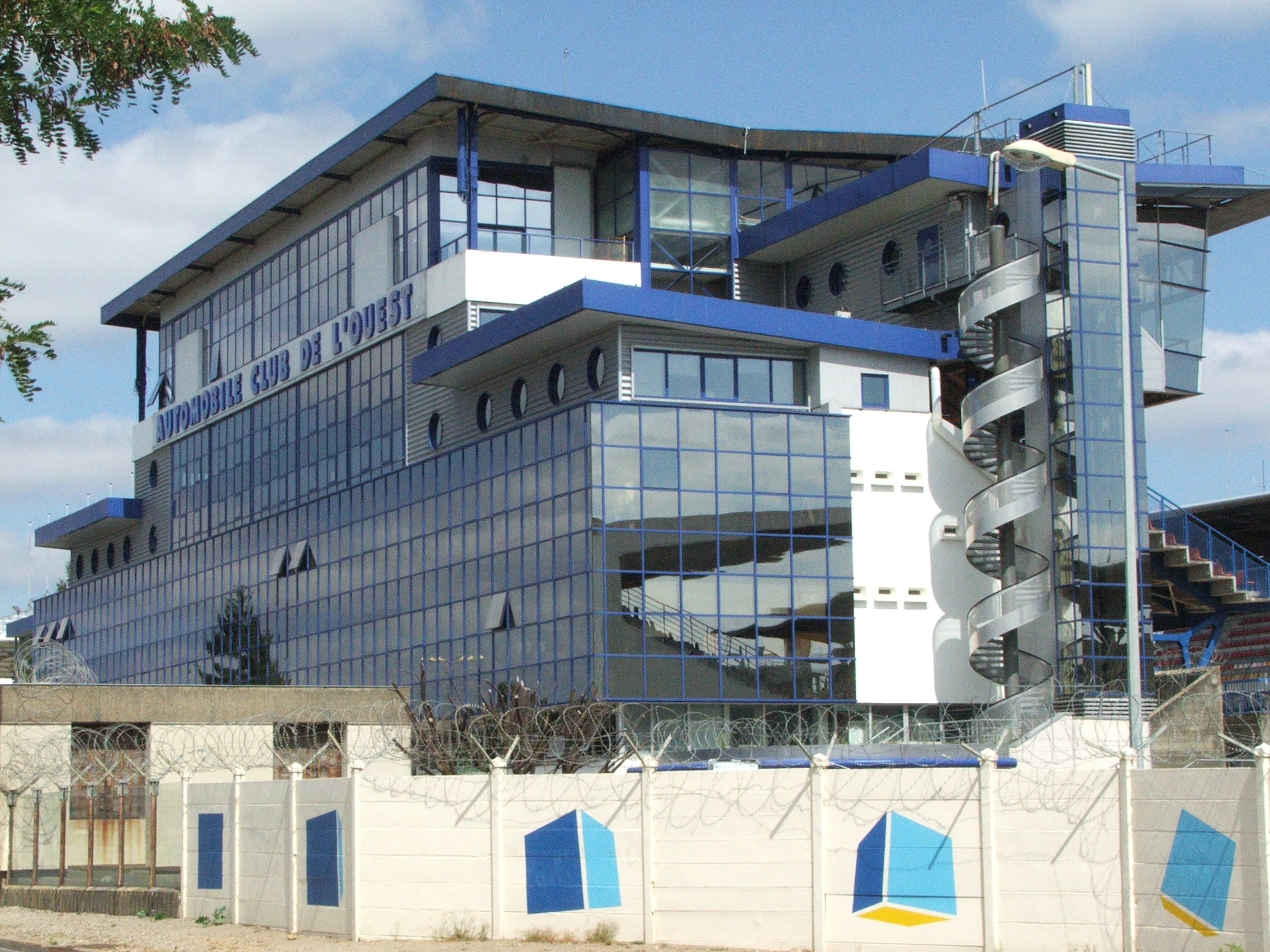 Le siège de l'Automobile Club de l'Ouest sur le Technoparc des 24 heures.